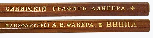 Алибер, Иван Петрович (фр. Jean-Pierre Alibert; 1820—1905) — французский и русский промышленник, владелец графитового рудника в Саянах. Среди художников-графиков известен так называемый Сибирский графит Алибера (алиберовский графит).